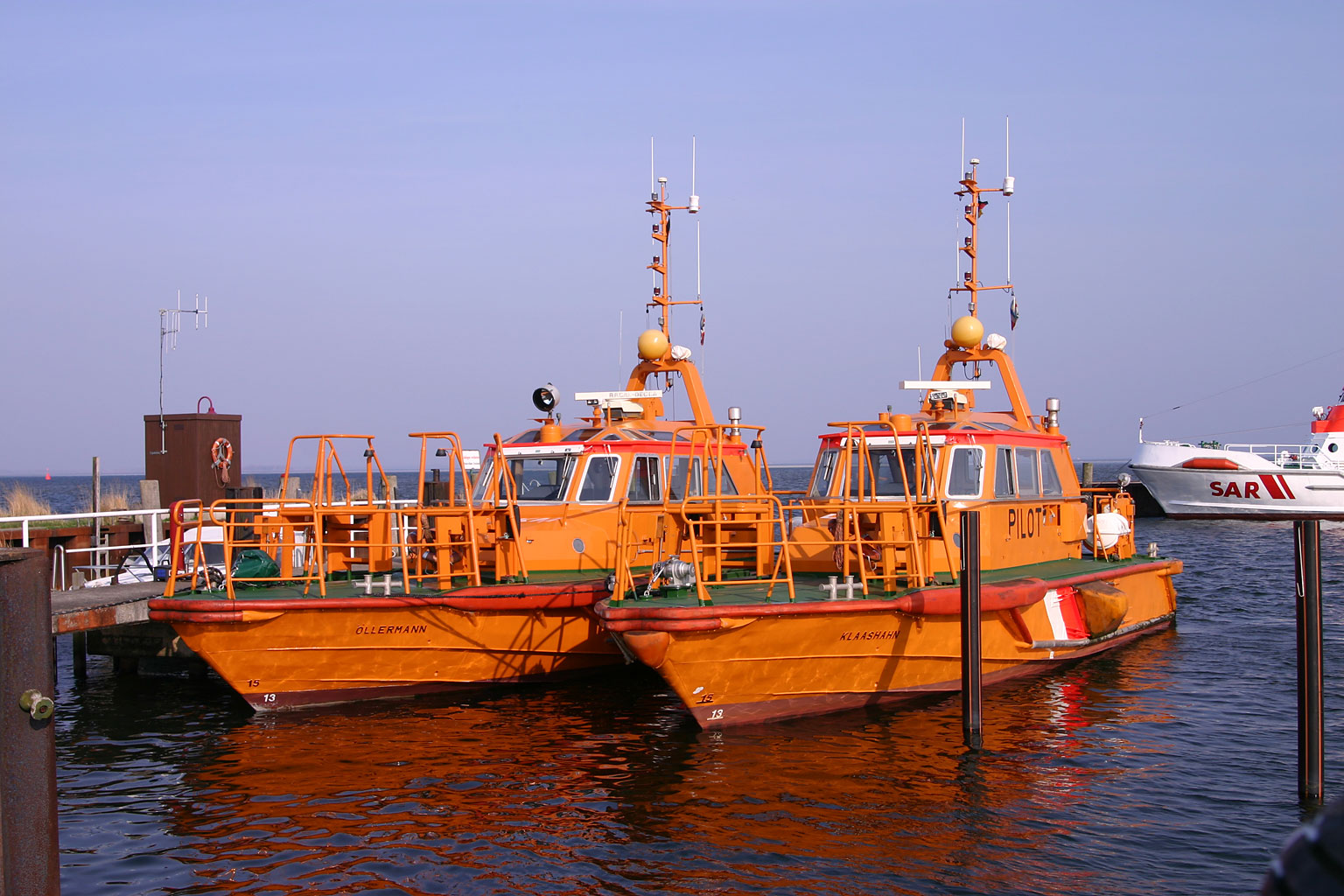 Pilotboats "Klaashahn" and "Öllermann" in barhöft